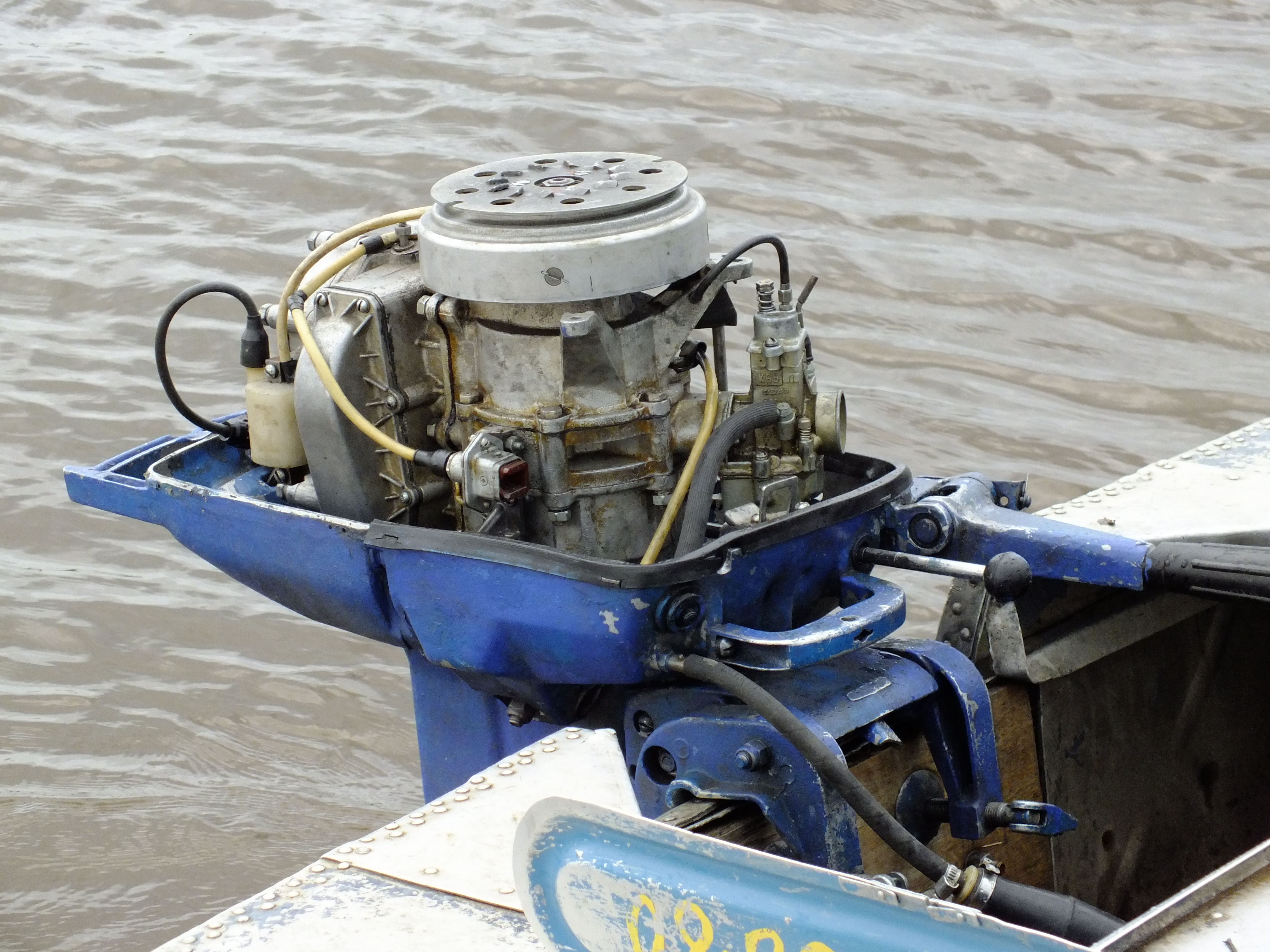 Лодочный мотор Нептун-23 без кожуха